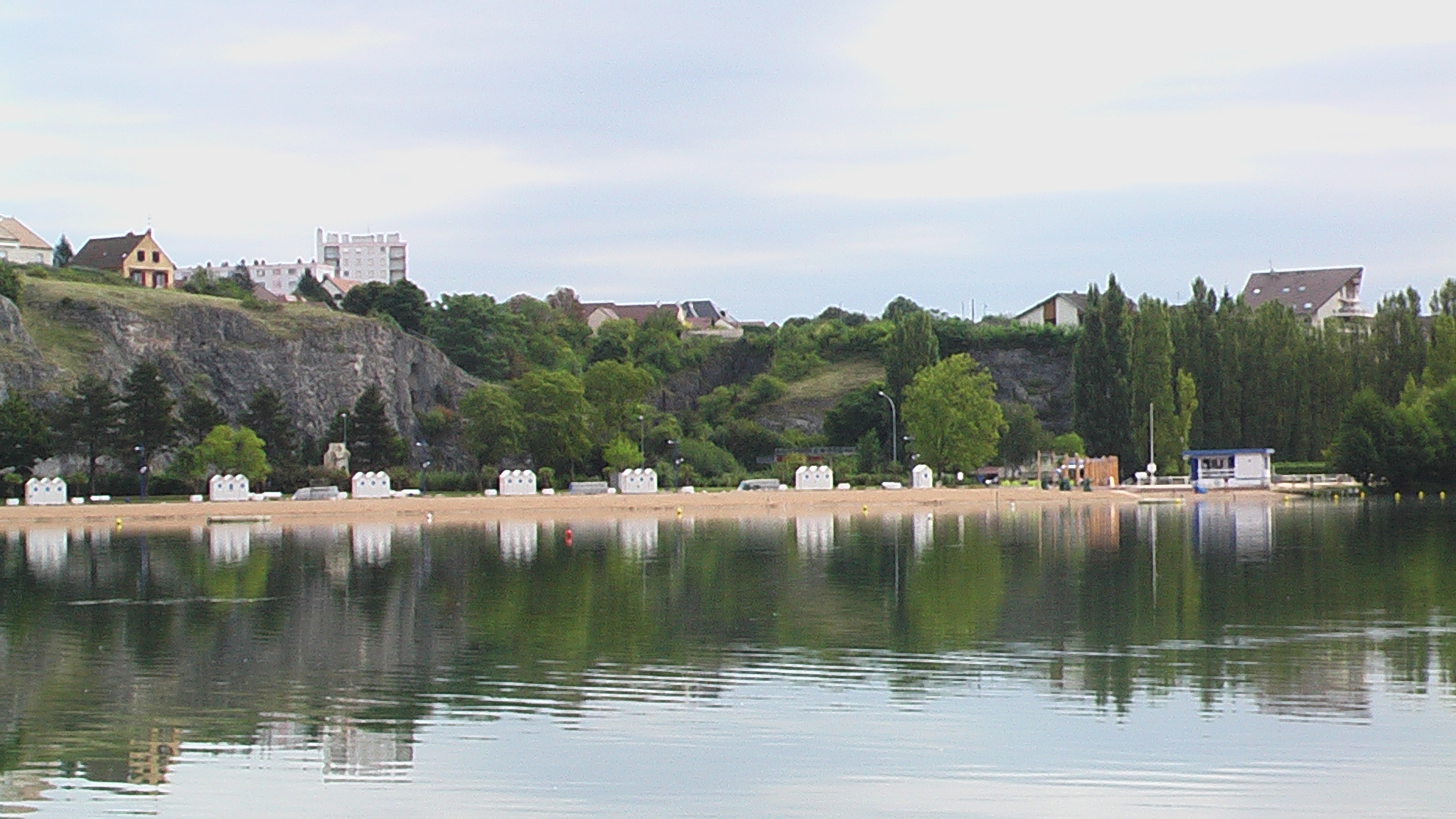 Plage de baignade du Lac Kir, vue depuis la rive droite (sud). Les installations de plage temporaires sont le fait de l'opération Dijon Plage.